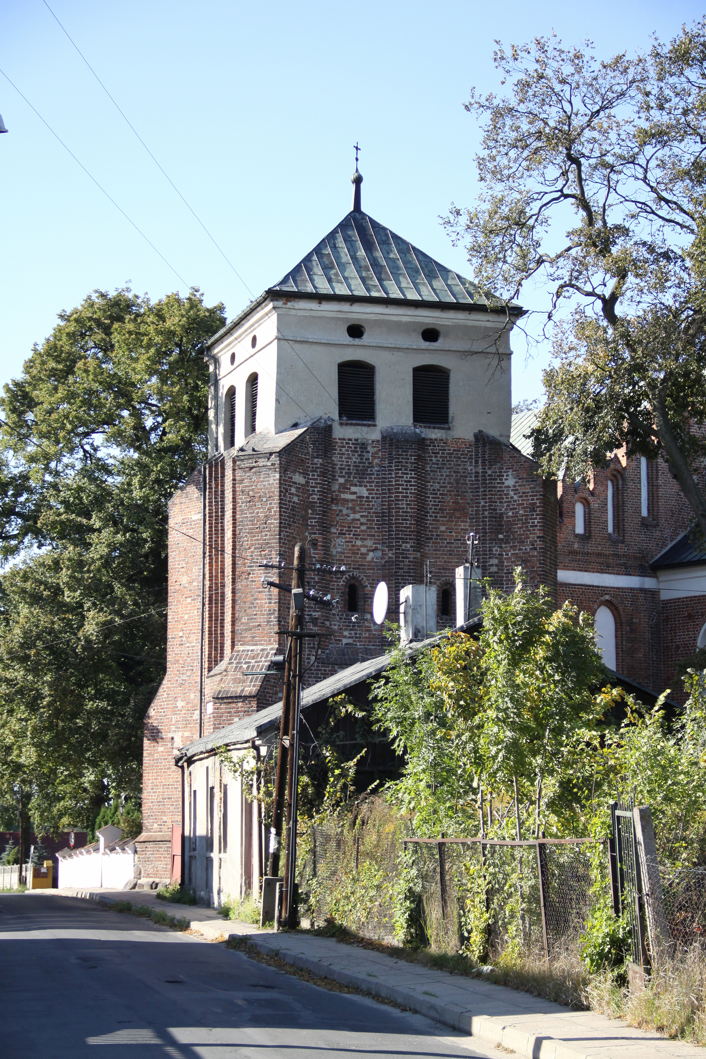 Szadek - dzwonnica XIV w. (zabytek nr 851 z 28.12.1967)